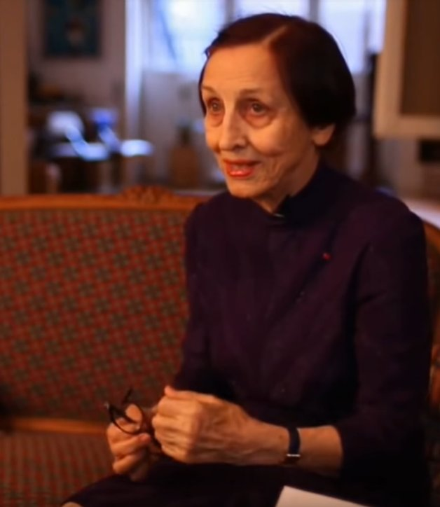 Françoise Gilot lors d'un entretien